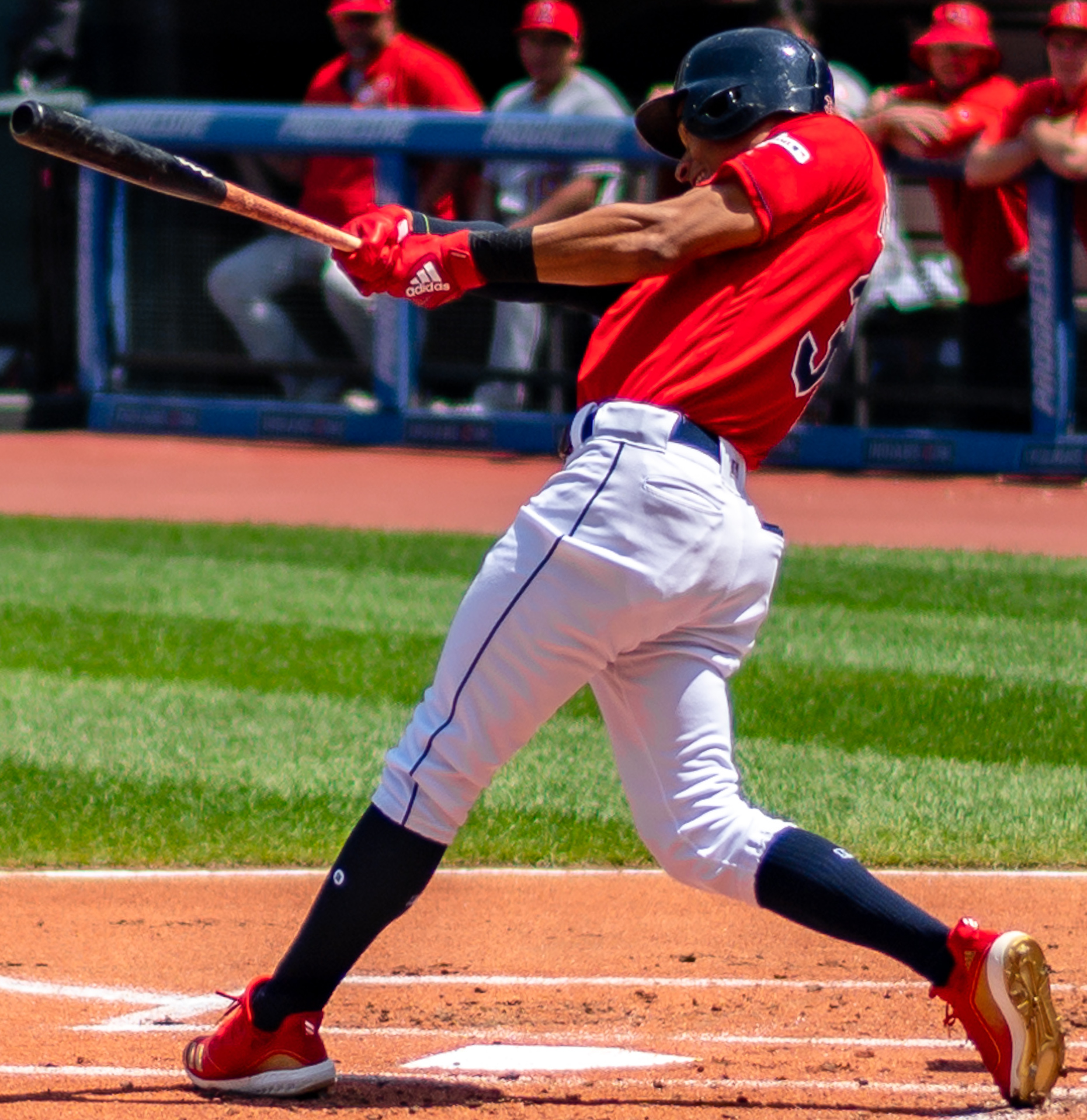 Oscar Mercado